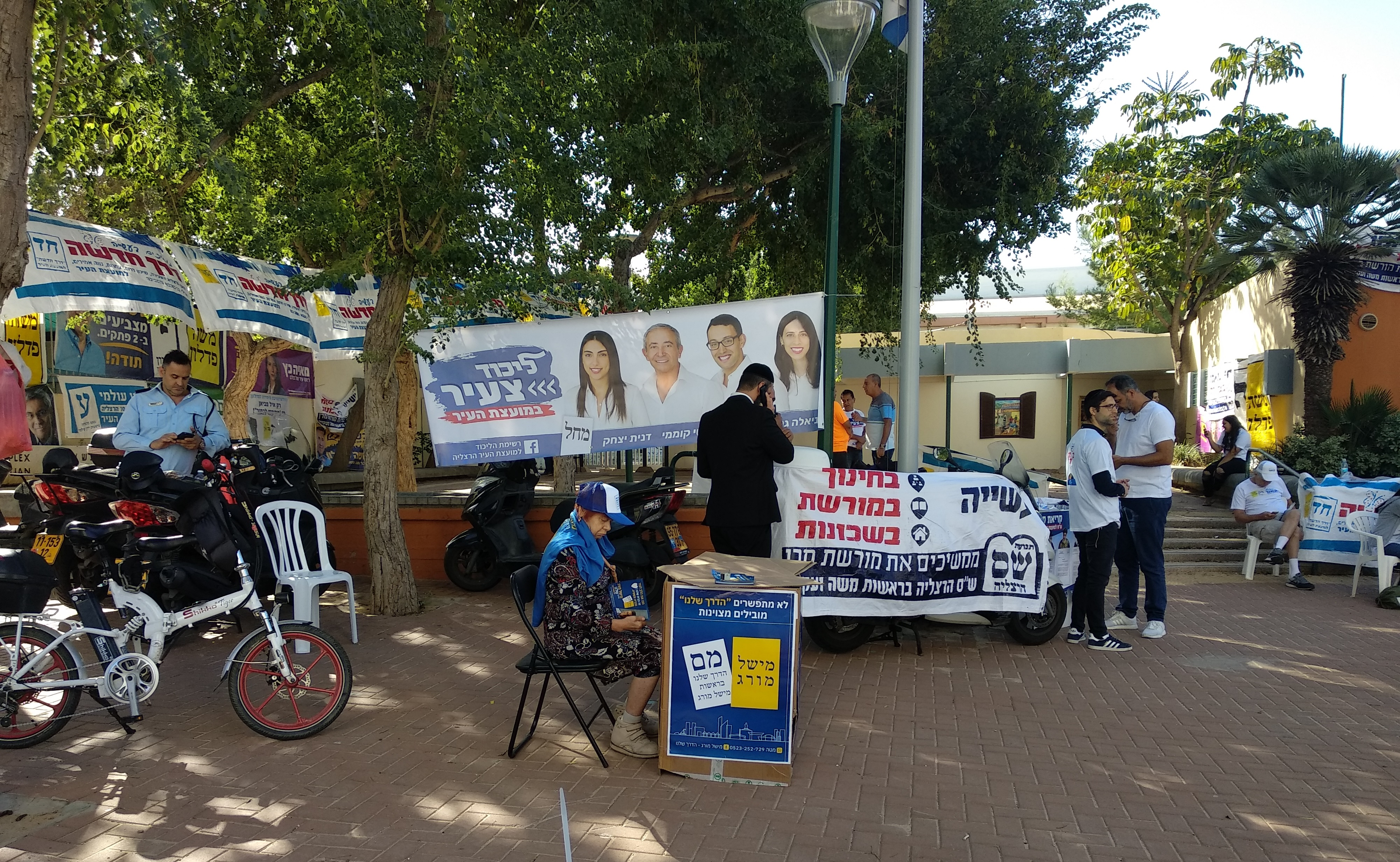 בכניסה לקלפי בהרצליה, בית הספר בן צבי בבחירות לרשויות המקומיות 2018.